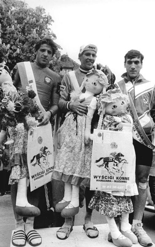 A. Saitow, J. Draaijer, D. Abdushaparow ADN-ZB Kasper 21.5.87 Polen: 40. Internationale Friedensfahrt-12. Etappe von Legnica nach Wroclaw über 180 km- Lustige Folklorepuppen erhielten die drei Erstplazierten von Wroclaw. Bildmitte der nun schon zweifache Tagessieger Johannes Draaijer (Niederlande). Rechts der Etappenzweite Dshamolidin Abdushaparow und links der Dritte Asjat Saitow (beide UdSSR).